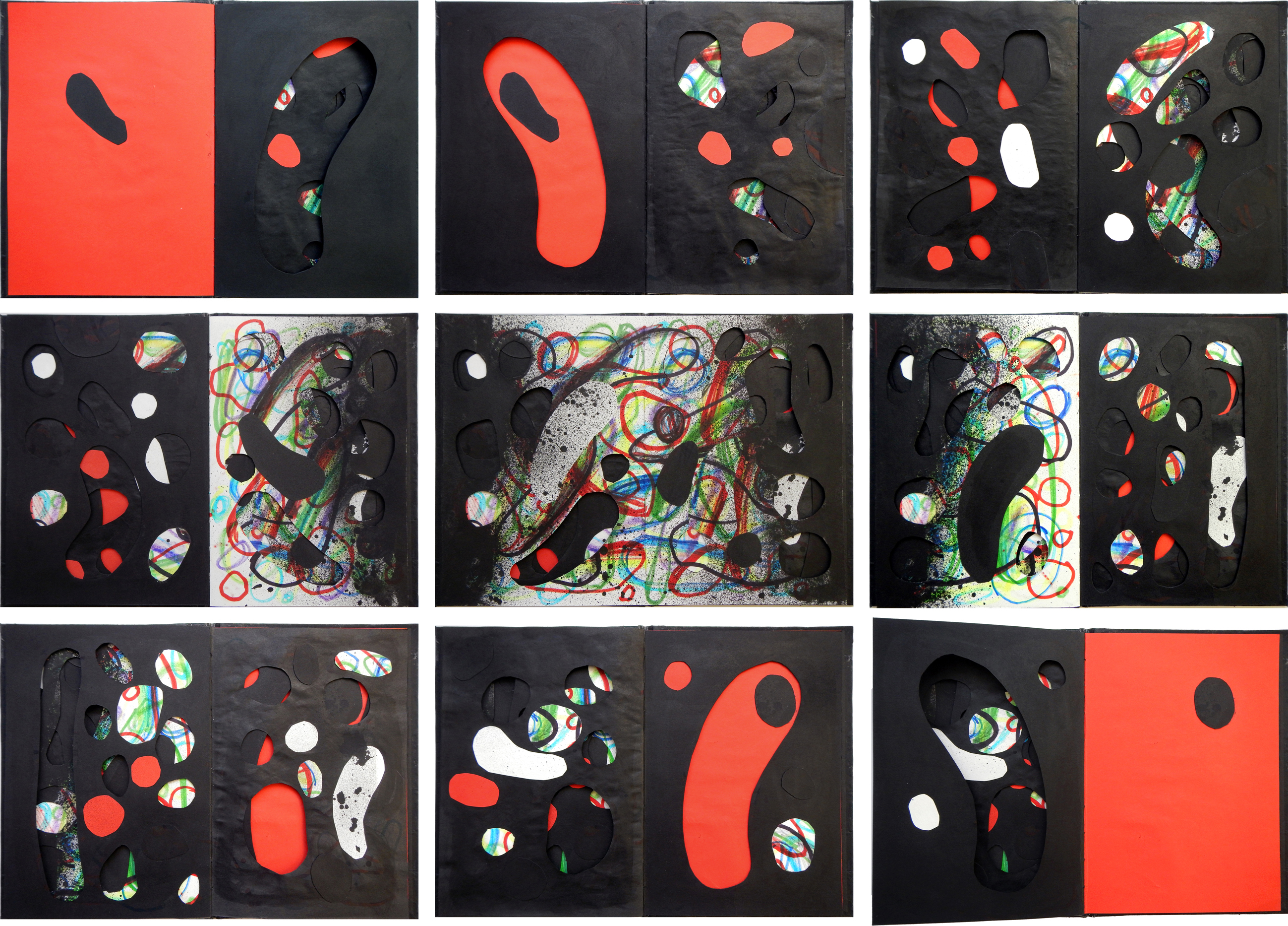 Алексей ПАРЫГИН The Birth of the World / Рождение Мира. (9 разворотов). Уникальный экземпляр. 2017-18 гг. (окончена 4.11_2018). Подписан автором-художником. В сложенном виде — 21,5 Х 15,5 Х 0,7 см; 21,5 Х 31 см (разворот). 20 страниц. Твердый переплет. Вес 1 экз. — 50 гр.